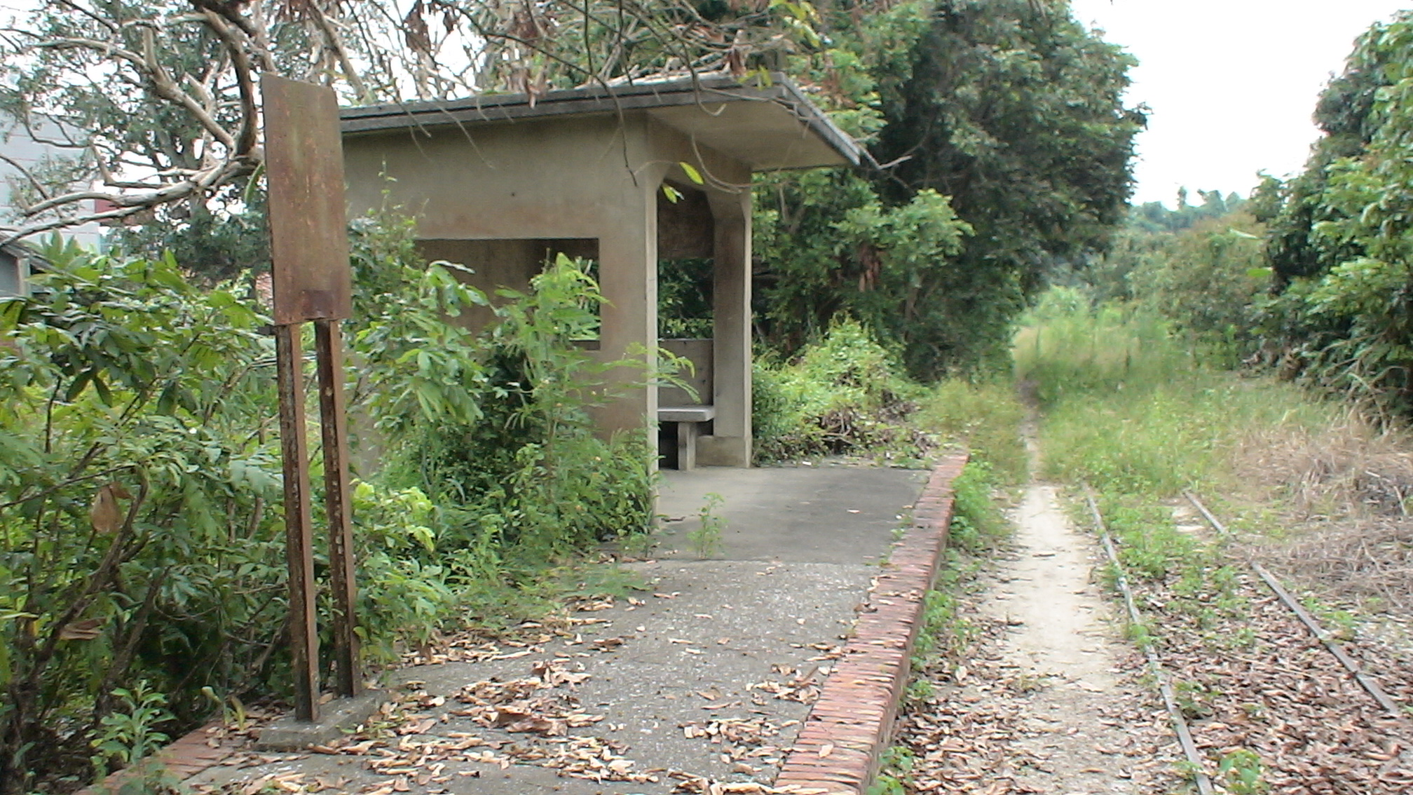 Sialiaozih Station, Dongshan, Tainan, Taiwan